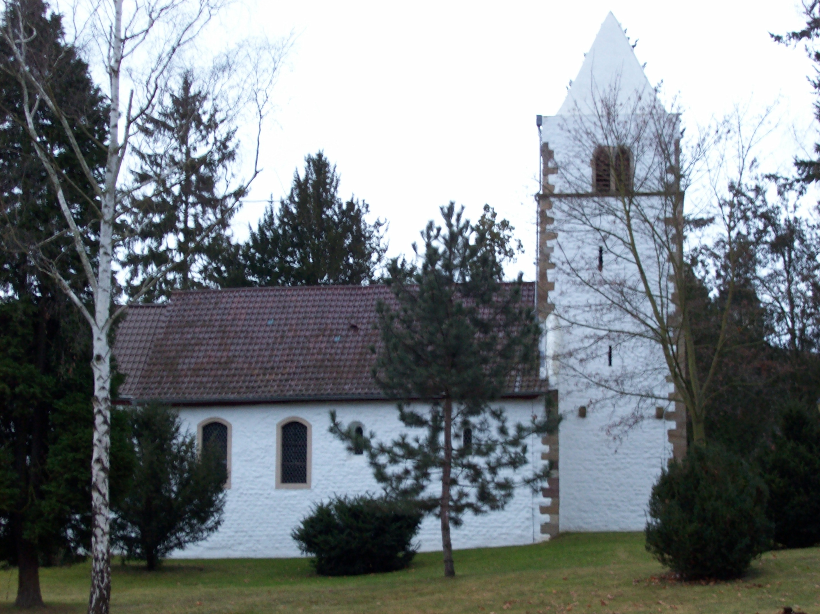 Evangelisch Wehrkirche Bad Münster am Stein / Ebernburg